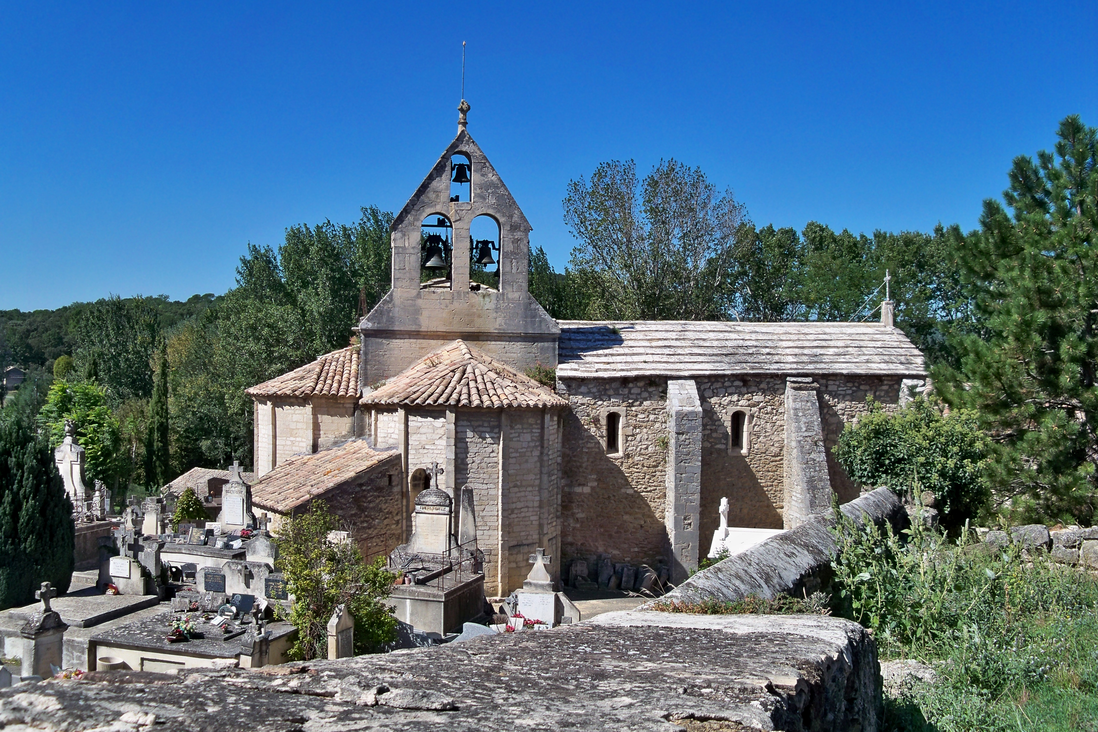 vue sur l'église de La Baume de Transit